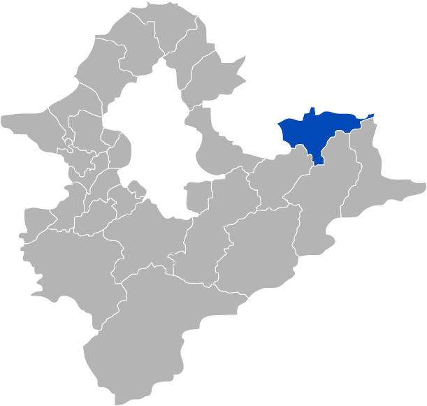 KaurJmeb為編寫中華民國臺灣省臺北縣瑞芳鎮，於2005年2月6日所繪。